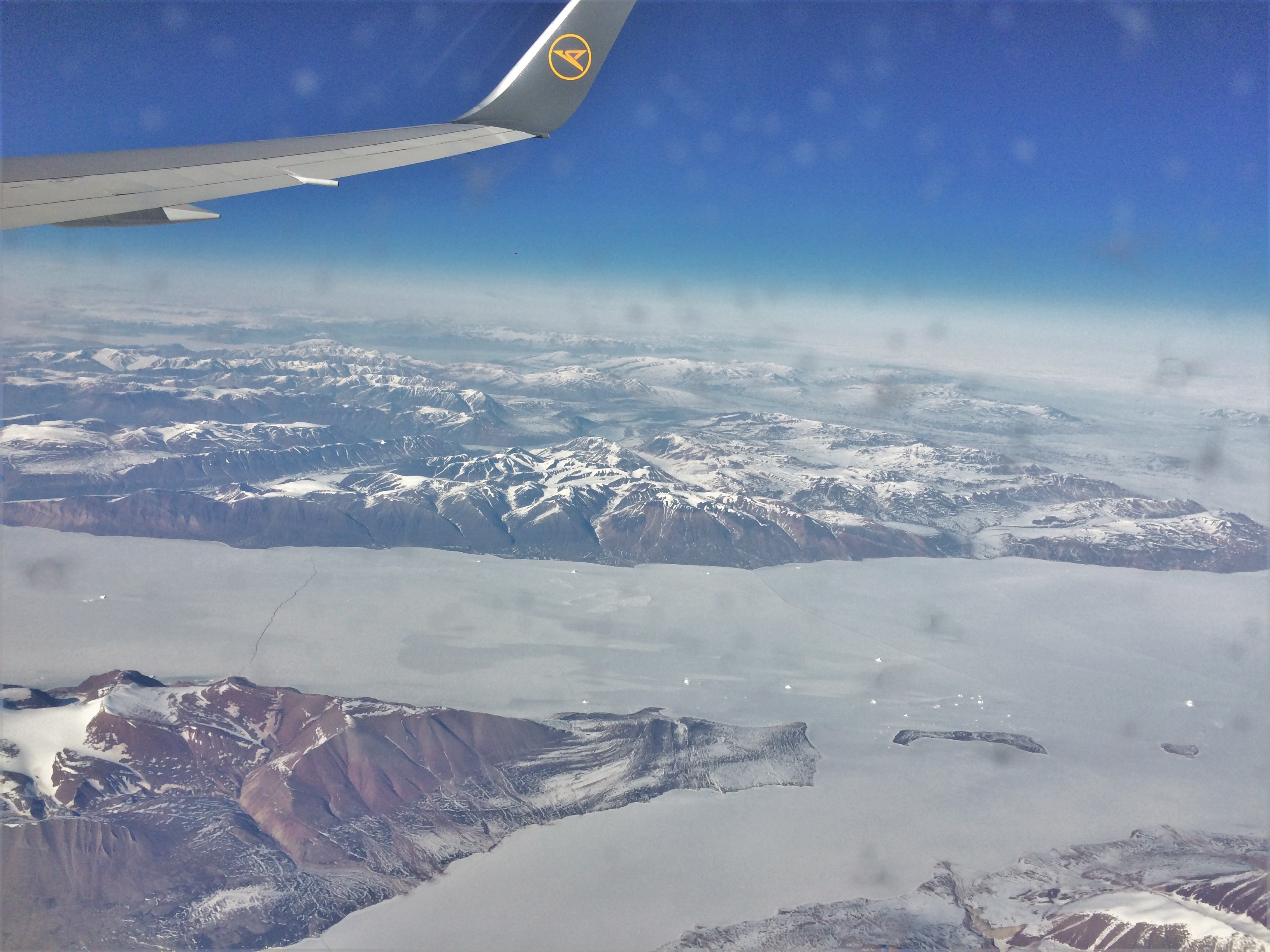 Isola Ymer Ø